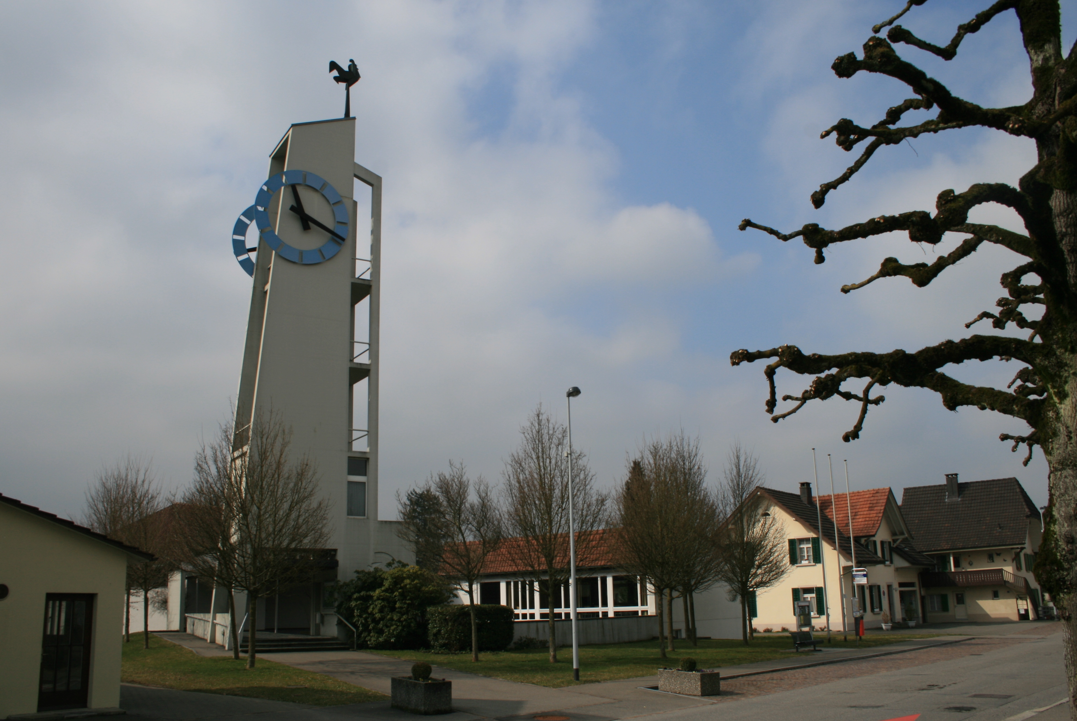 Reformierte Kirche Hunzenschwil